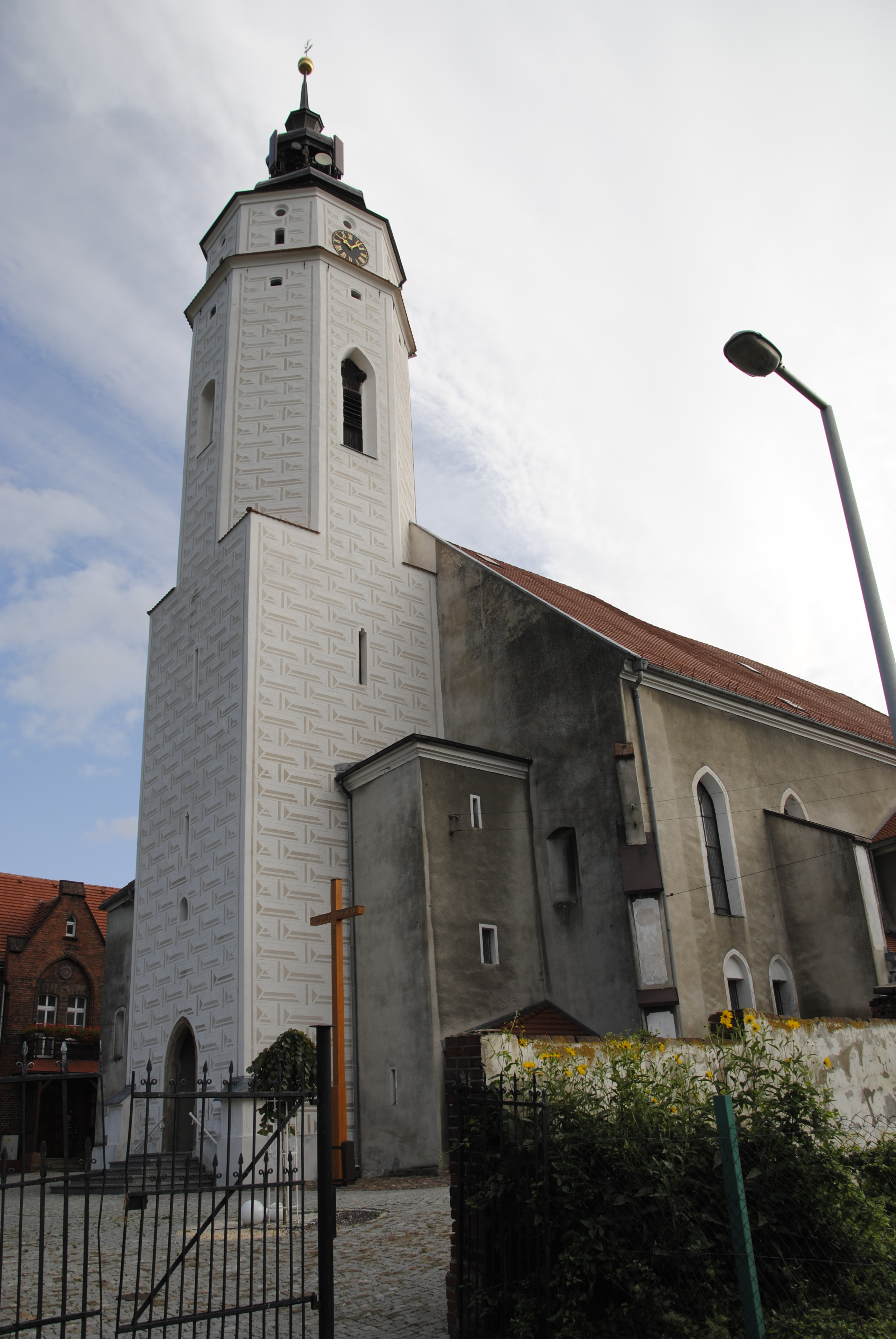 Mariä-Himmelfahrt-Kirche in Zülz (Oberschlesien)